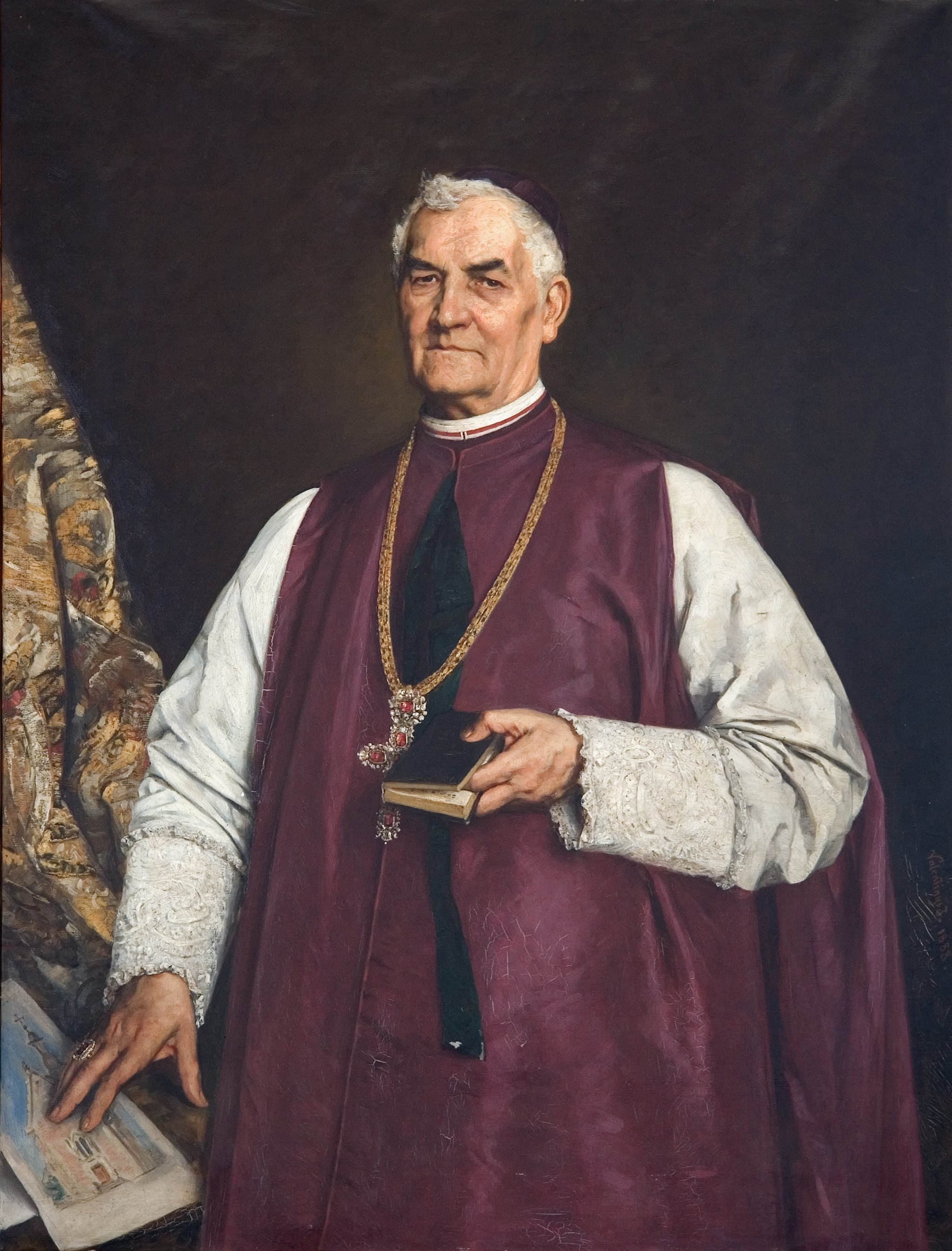 Festmény Pauer János püspökről Székesfehérváron, a Püspöki Palotában. Festő: Valentiny János.